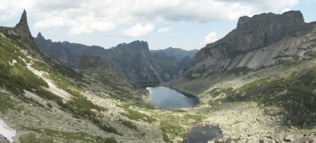 Озеро Горных Духов, хребет Ергаки, Западный Саян